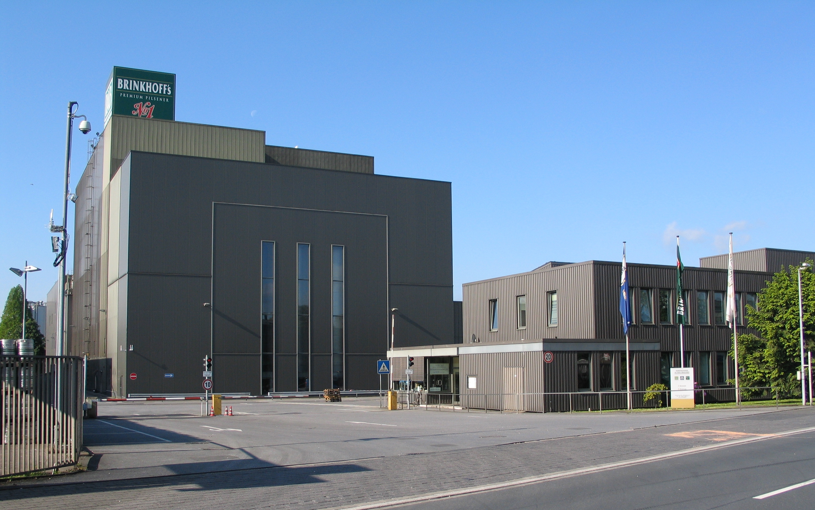 Actienbrauerei Dortmund